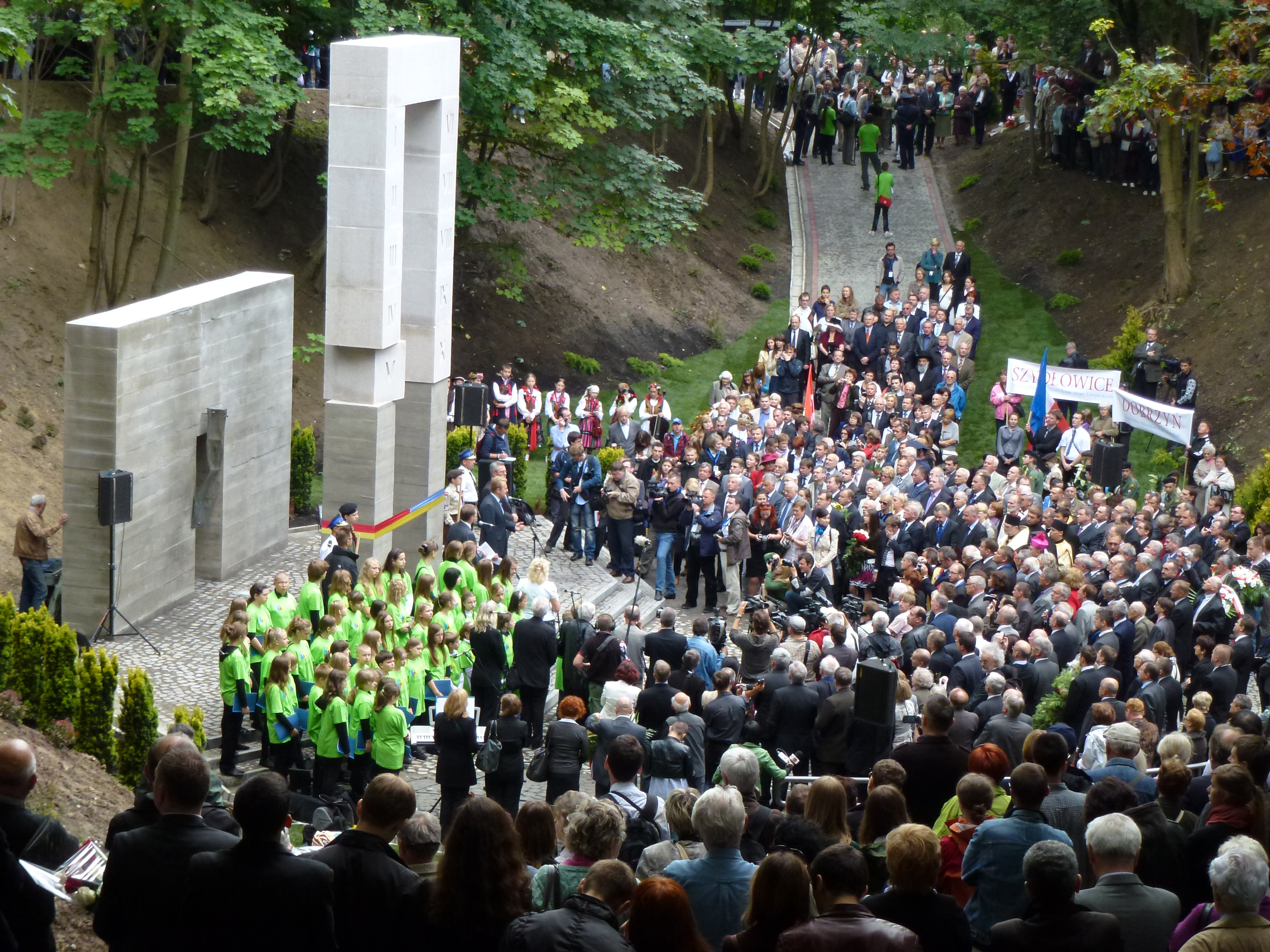 Uroczystość odsłonięcia nowego pomnika polskich profesorów zamordowanych przez Niemców na Wzgórzach Wuleckich w lipcu 1941 roku